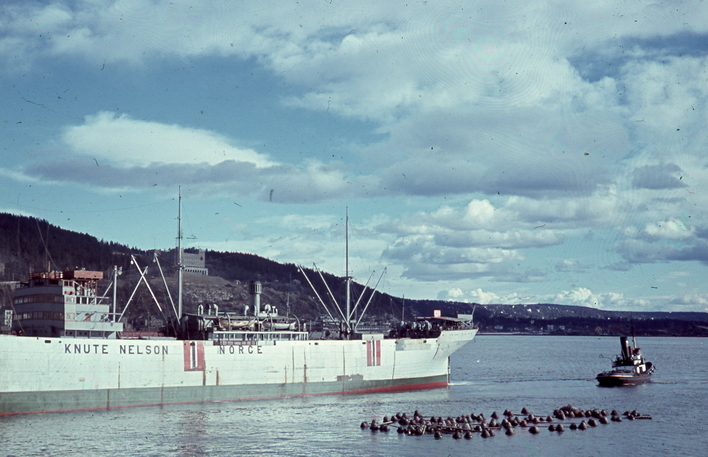 Båter ved kai og på havna. Knute Nelson Norge. Sannsynligvis fotografert av tysk soldat under krigen.